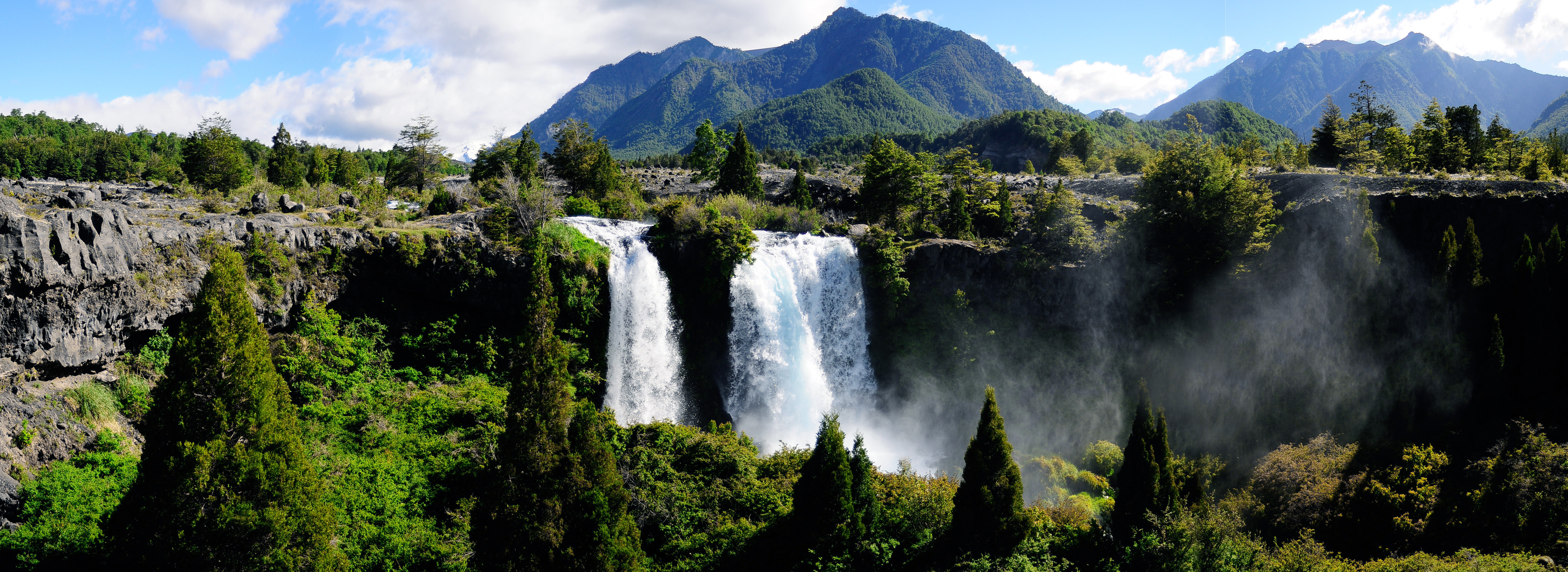 Panorámica del salto de Truful-Truful, Parque Nacional Conguillío, Araucanía, Chile